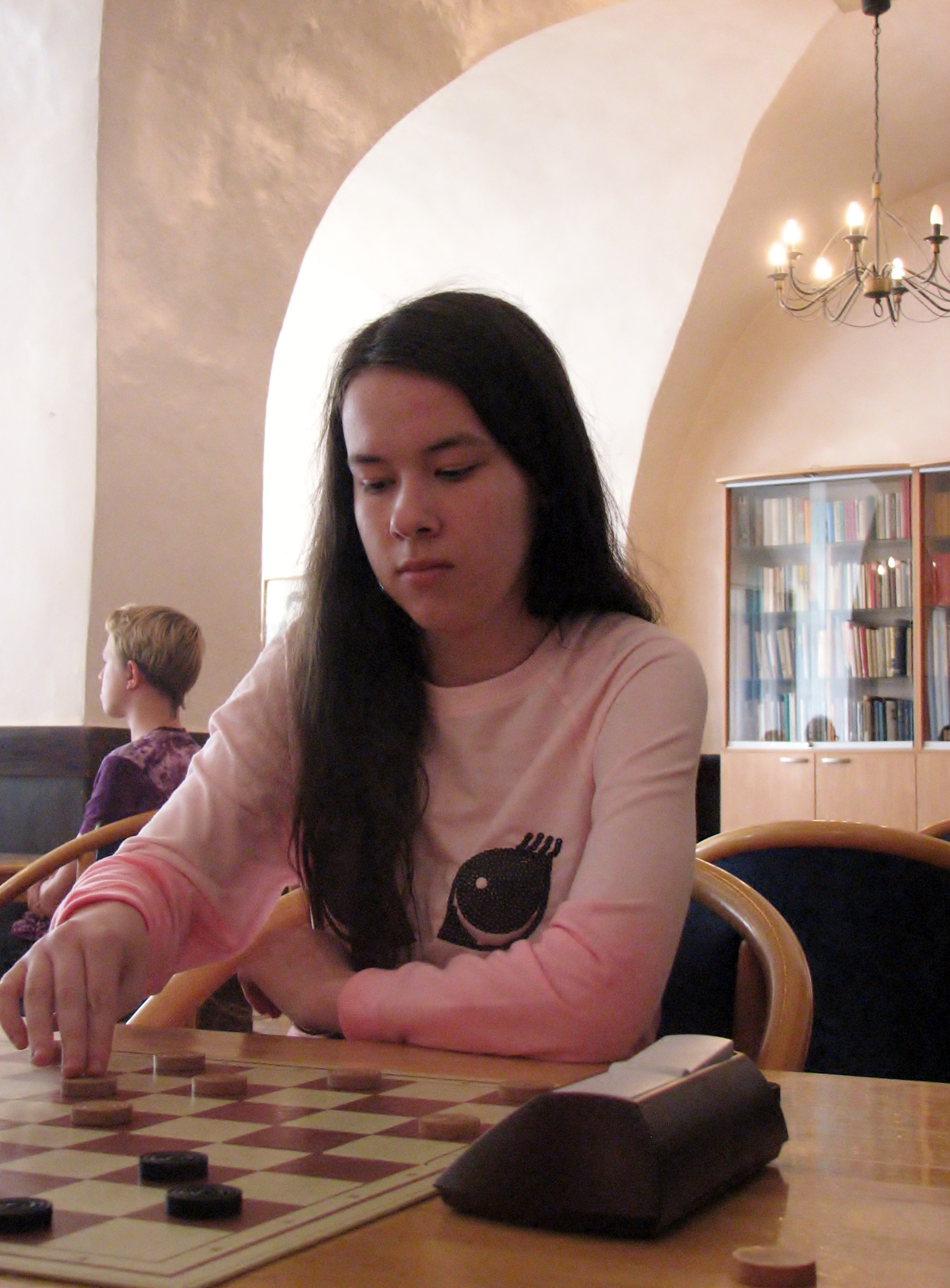 Anneli Trees Eesti meistrivõistlustel 64-ruudulises kiirkabes